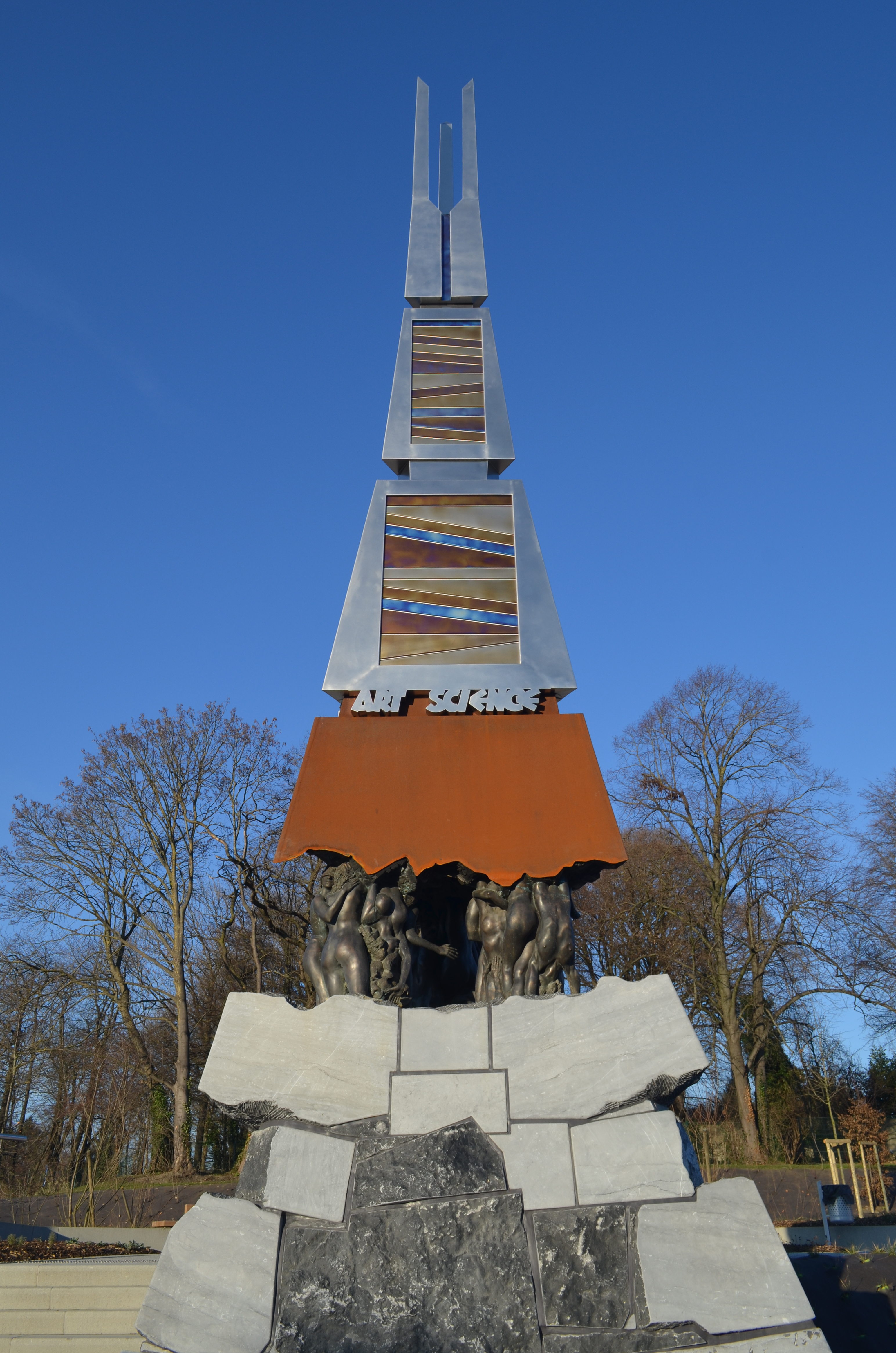 Charleroi - Hôpital civil Marie Curie - Félix Roulin - Les Âges de l'Humanité